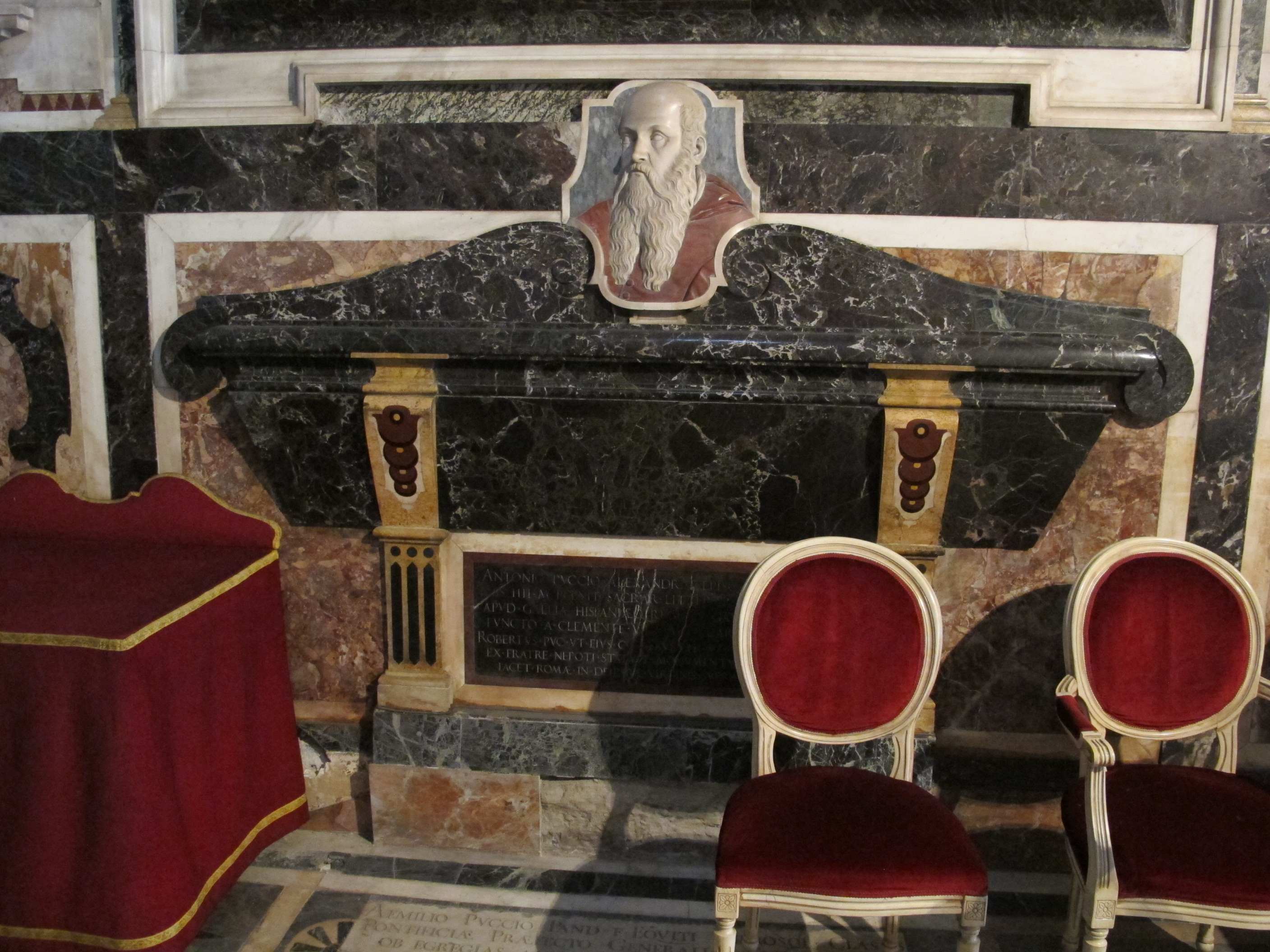 Ss. annunziata, cappella pucci 13 tomba antonio pucci